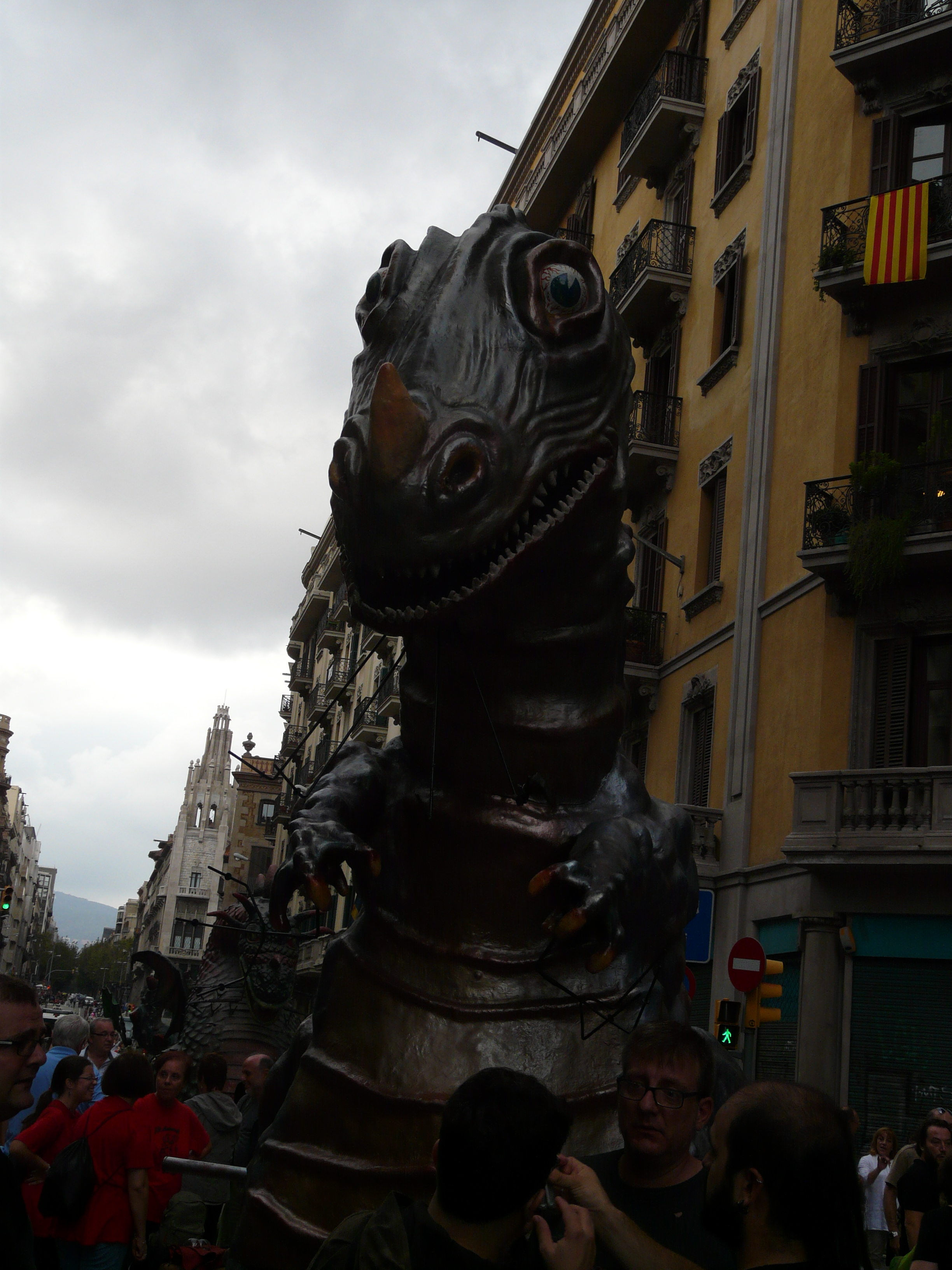 Imatge presa durant la tarda del diumenge 23 de setembre a les festes de la Mercè del 2012